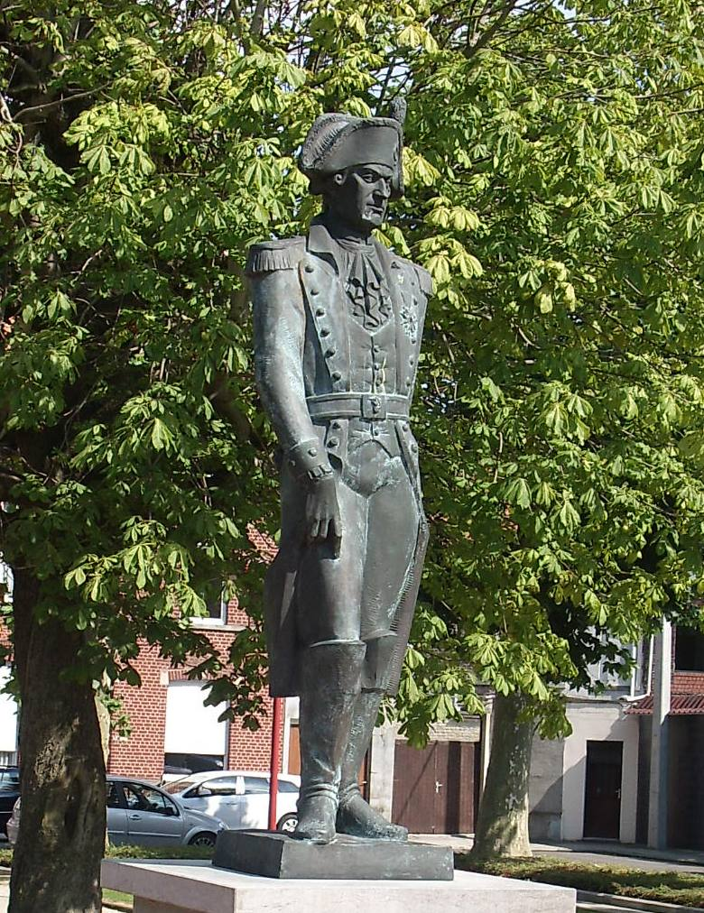 Standbeeld van generaal J.A. Van der Mersch op het Van der Merschplein in Menen (West-Vlaanderen, België)